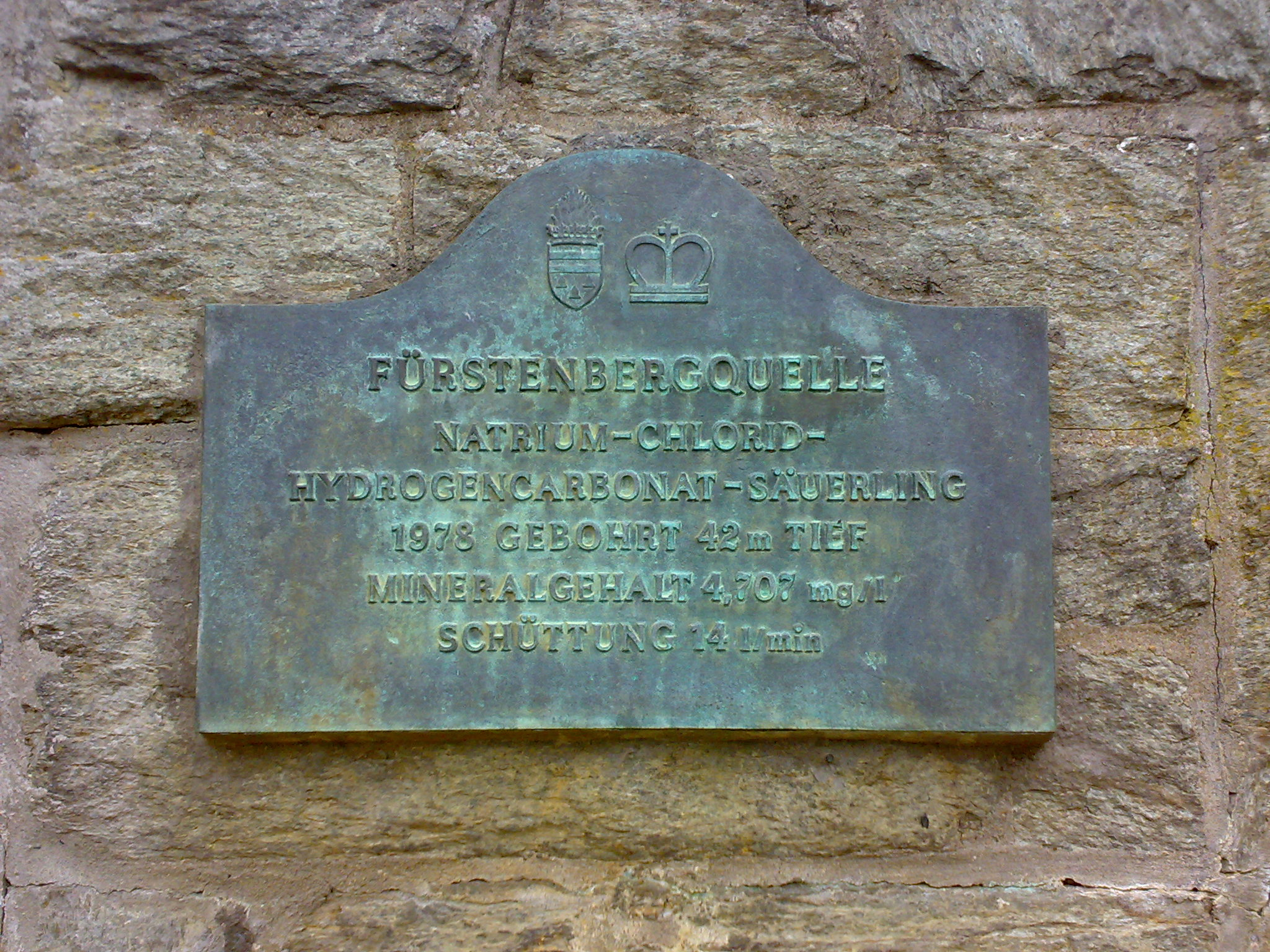 Quellenpark Kronthal, Fürstenbergquelle